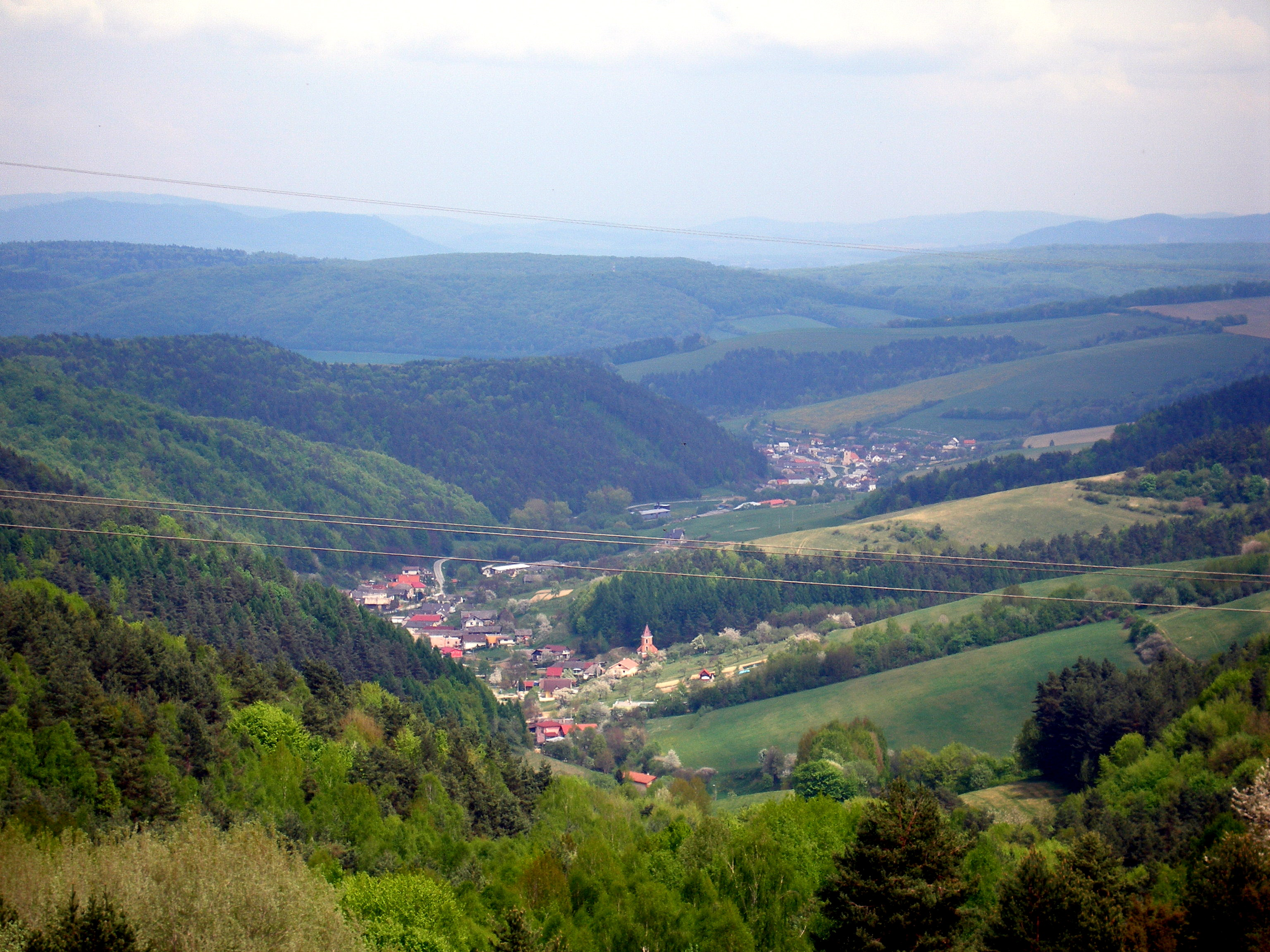 Obec Kvačany v pozadí obec Bajerov okres Prešov.